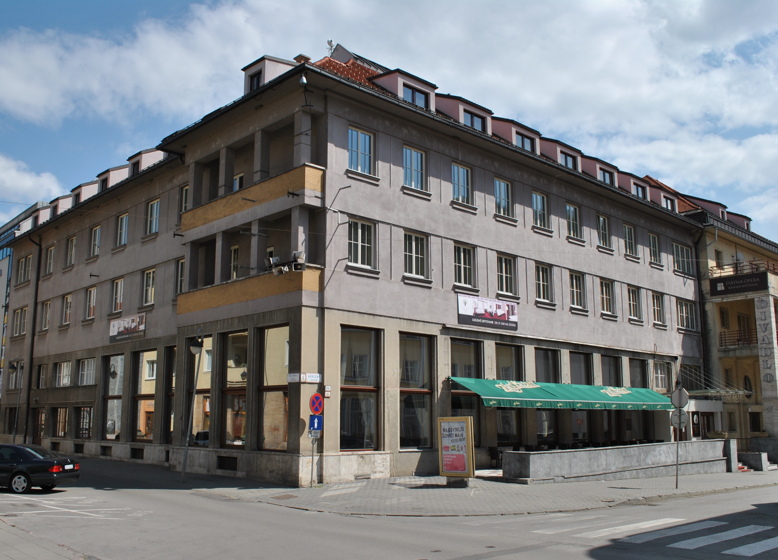 Národný dom; hotel pamätný